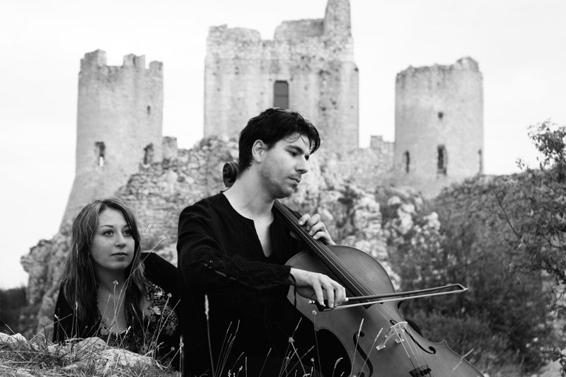 Alessandra Santovito e Francesco Forgione, fondatori della band Hexperos